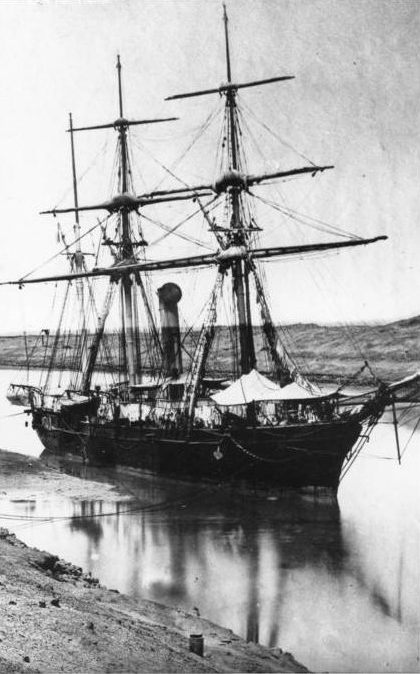 The aviso Latouche-Tréville (1860)